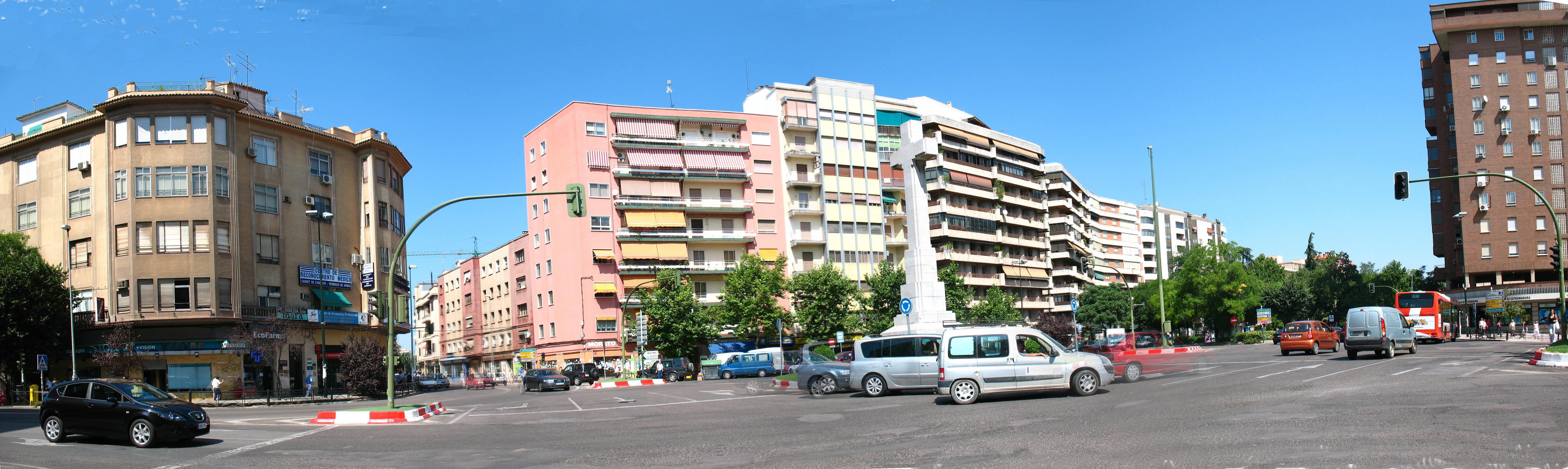 Panorámica de la Cruz de los caidos en la ciudad de Cáceres